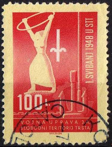 Первая почтовая марка Свободной территории Триест (Зона "Б") Free Territory of Trieste, Zone B